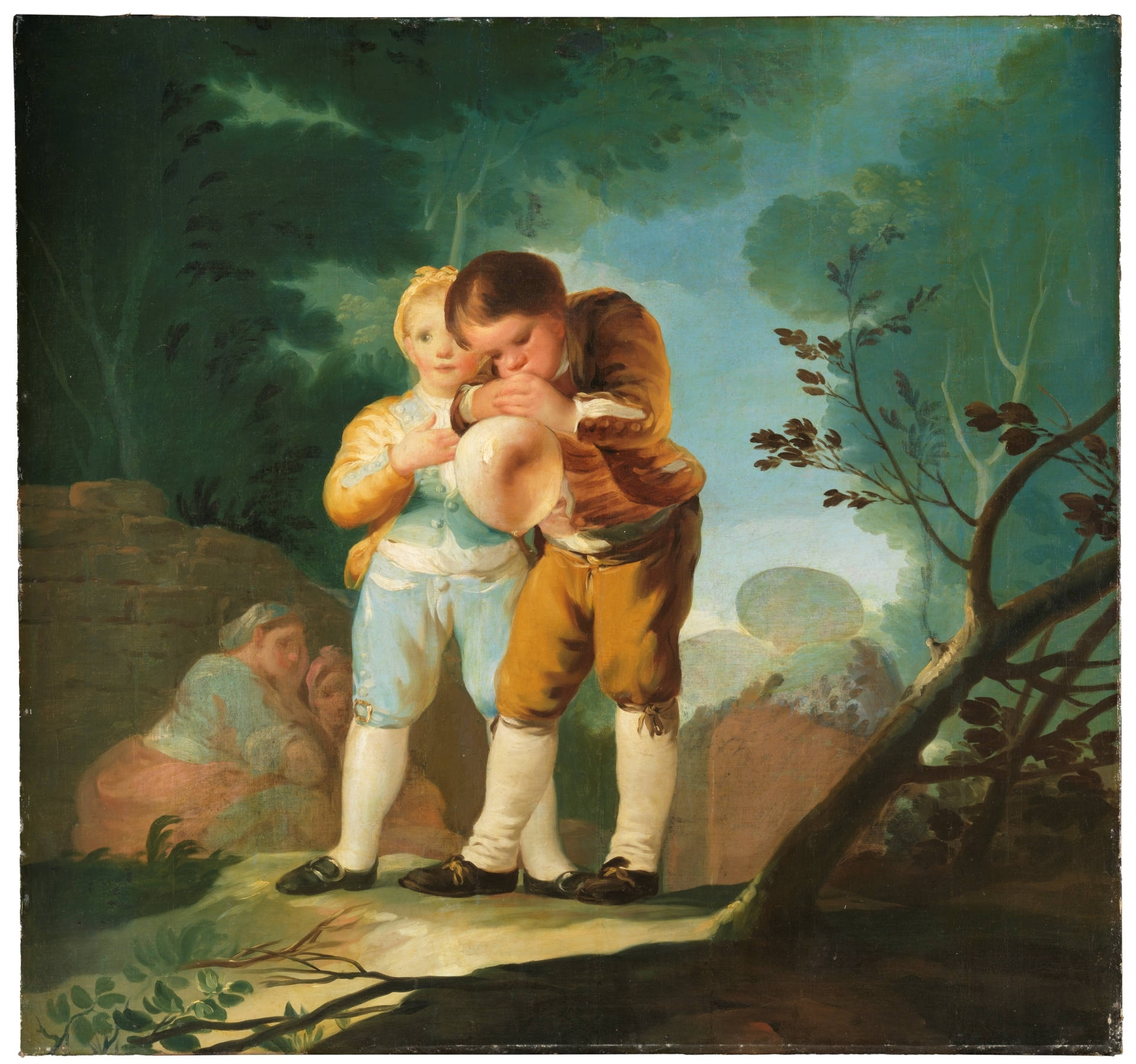 Cartones para tapices.